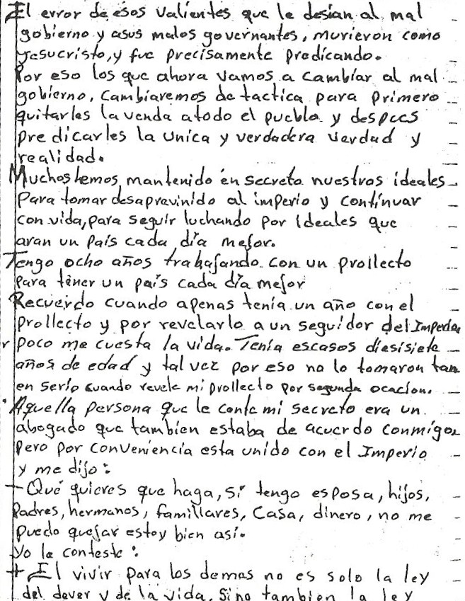 Página del "libro de actas" de Mario Aburto Martínez, utilizado como evidencia en la investigación por el asesinato de Luis Donaldo Colosio Murrieta.